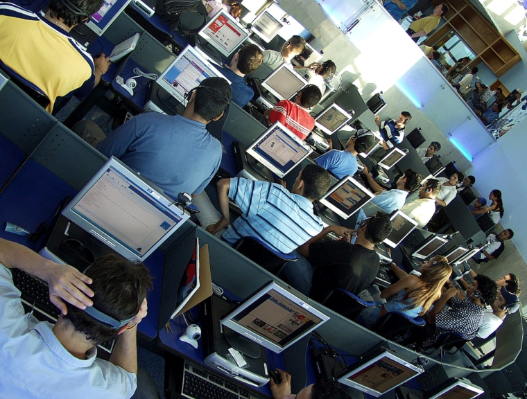 Toma interna del café internet Cafe Du Nord ubicado en las instalaciones de la Universidad del Norte en Barranquilla, Colombia.